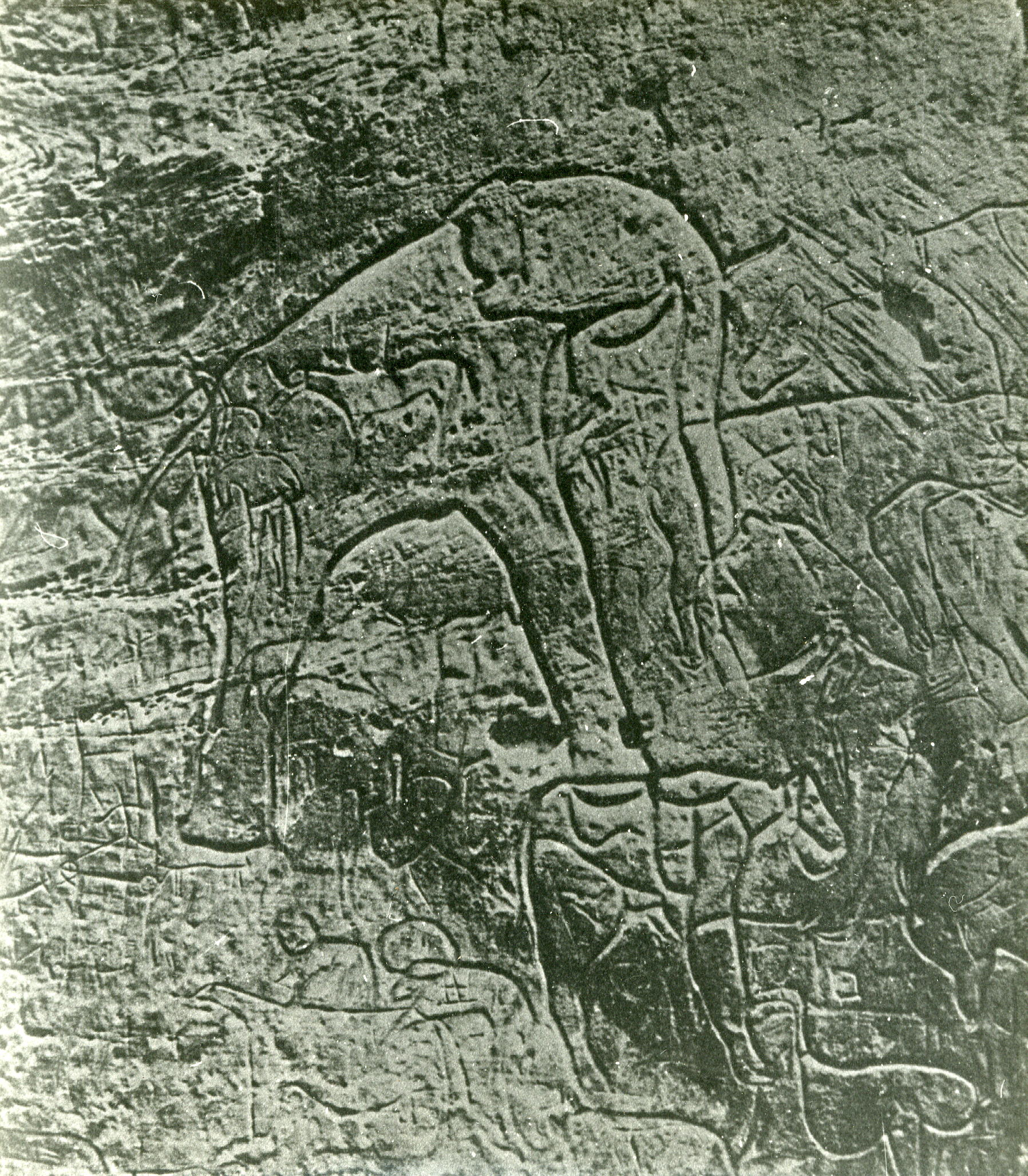 gravure préhistorique de la région de Djelfa (Algérie), plus précisément Oued el Hesbaïa Daïra de Sidi Makhlouf la Wilaya de Laghouat.